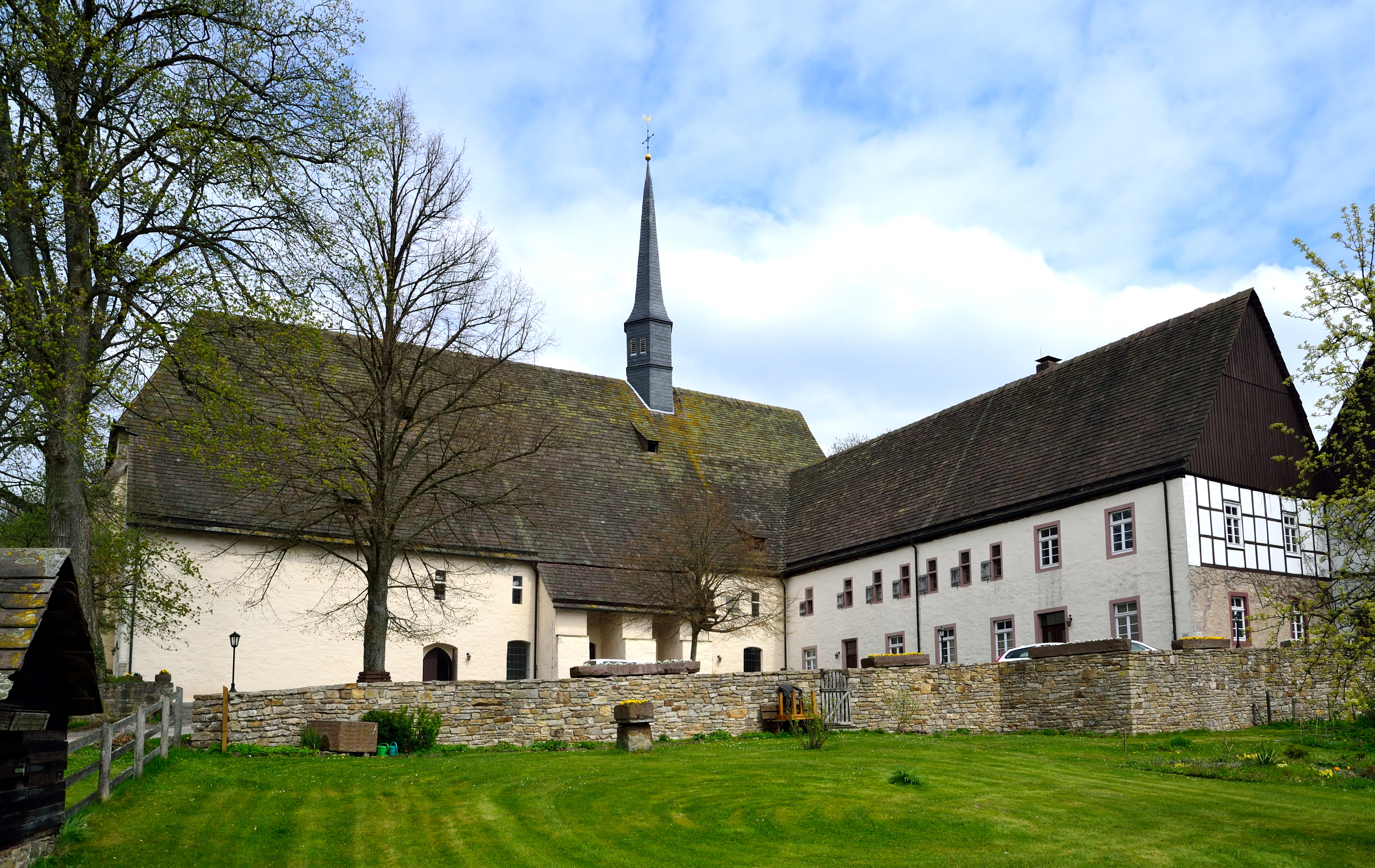 Evangelisch-reformierte Klosterkirche Falkenhagen und Kapitelsaal